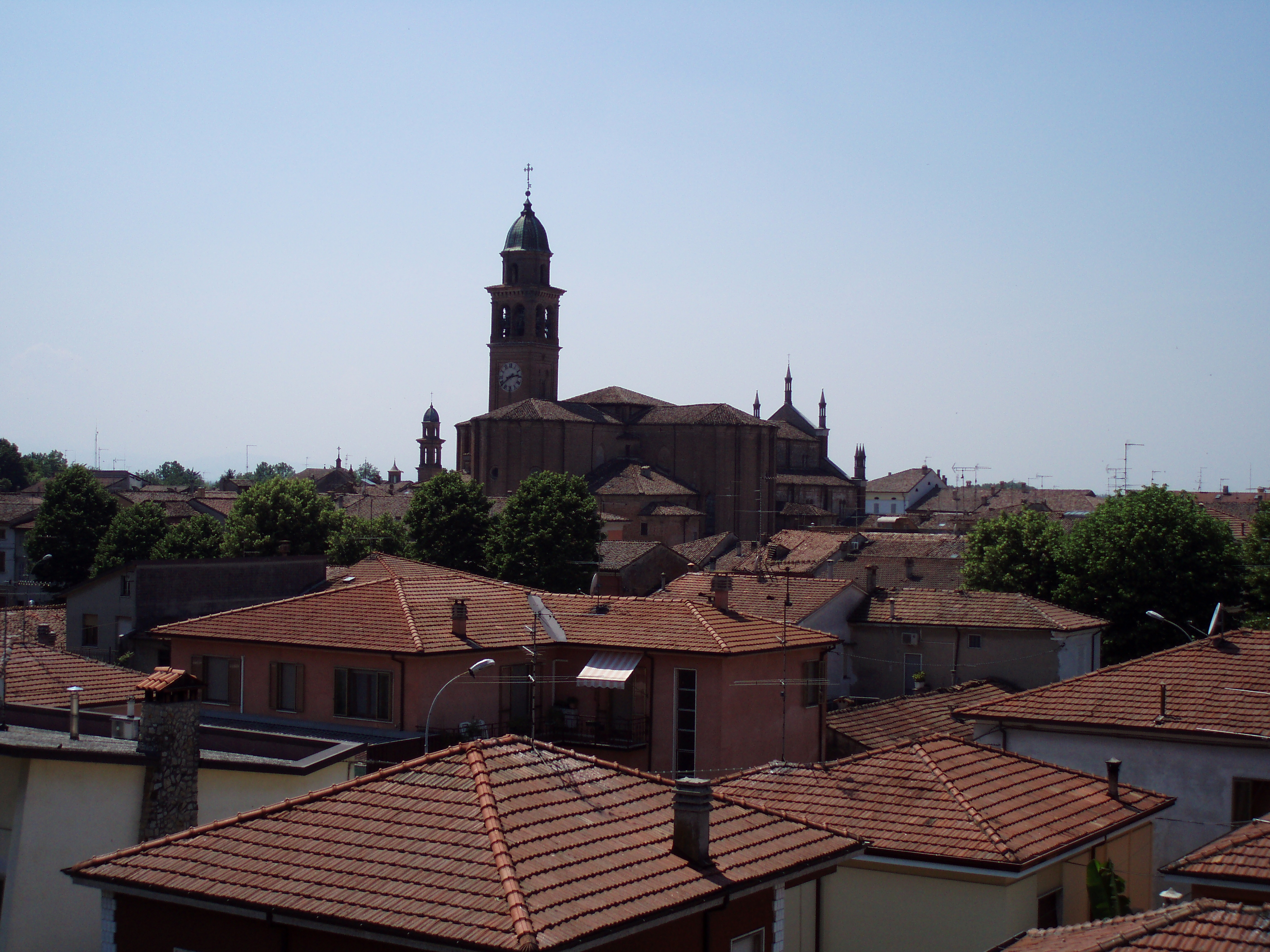 Vista absidale della Collegiata di santa maria delle Grazie in Cortemaggiore. Foto personale del maggio 2007